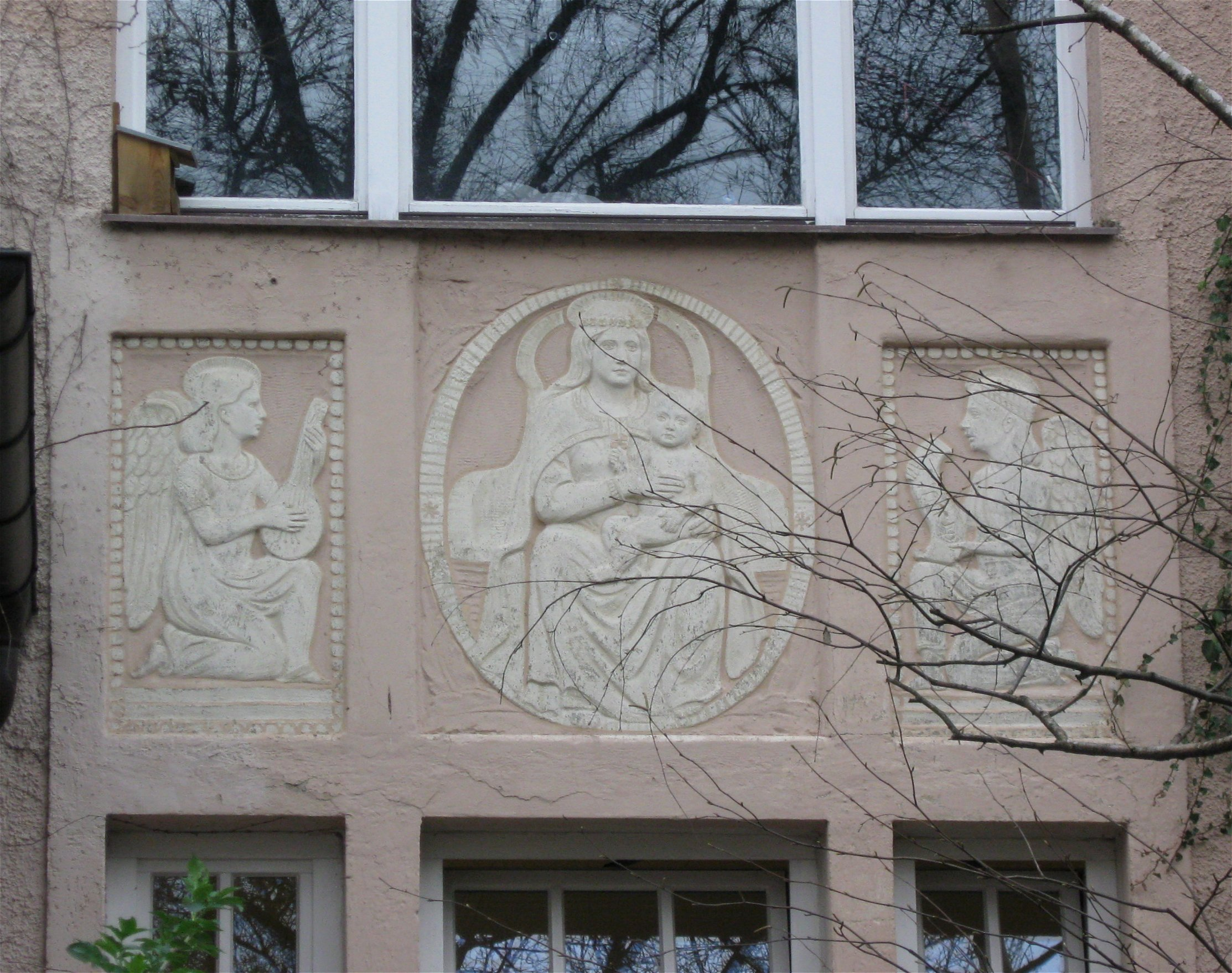 Adalbertstraße 106; Krippen-Anstalt, Jugendstil, mit Balkongittern, Relief und Vorgartentor, 1903 von Paul Liebergesell und Feodor Lehmann.